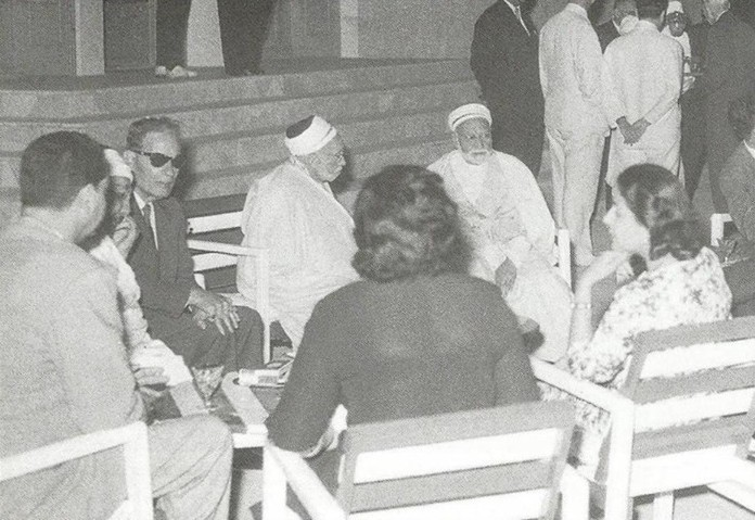 يبدو في الصورة شيوخ الأمة محمد العزيز جعيط ومحمد الطاهر ابن عاشور ثم محمد الفاضل ابن عاشور أتناء الزيارة التي أداها إلى تونس الشيخ الأزهري طه حسين